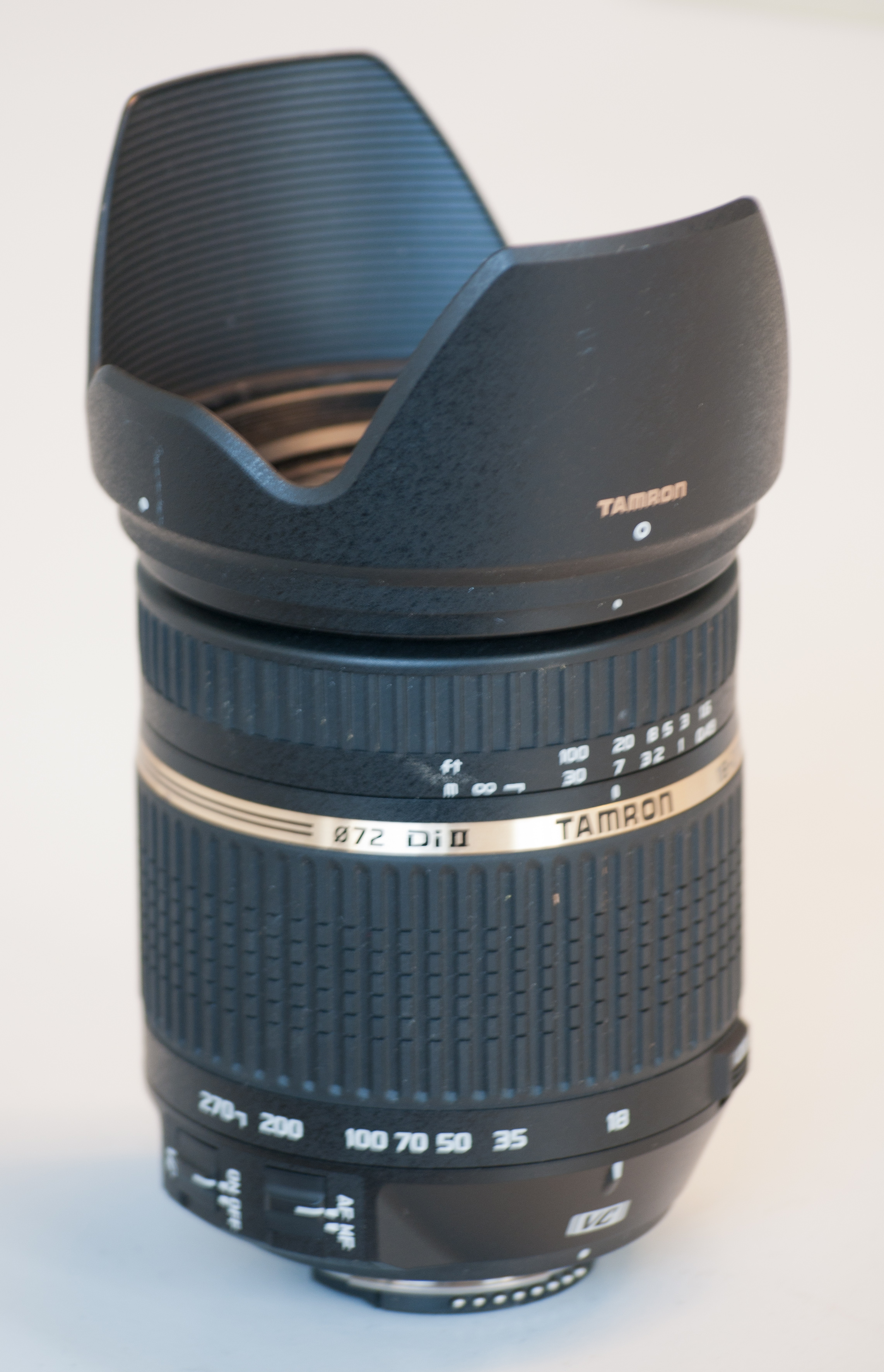 Tamron 18-270